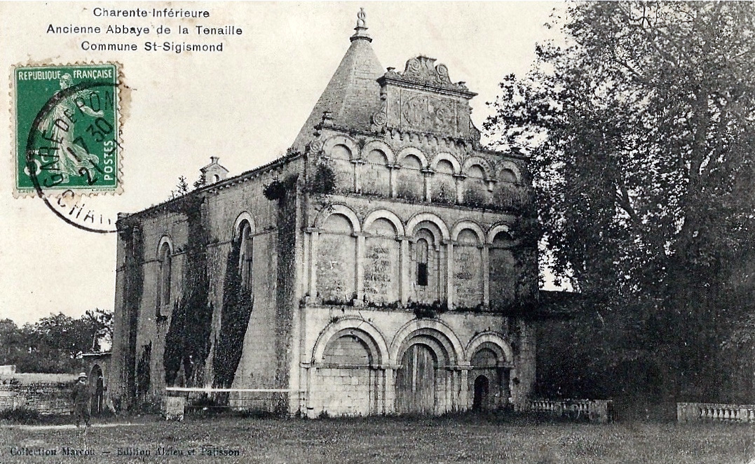 ancienne carte postale 1900 abbaye de la tenaille